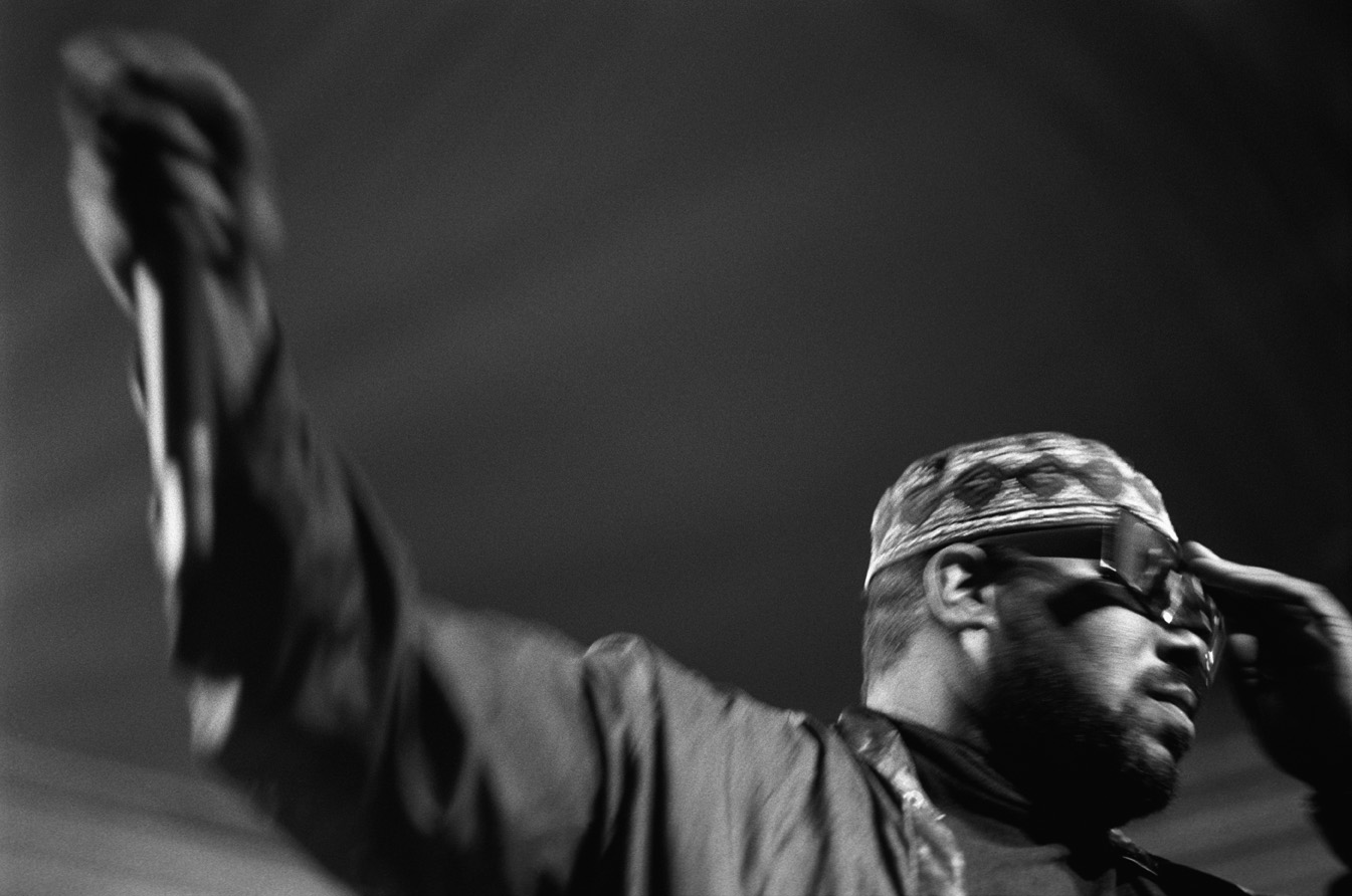 Afrika Bambaataa live in Eindhoven/Holland